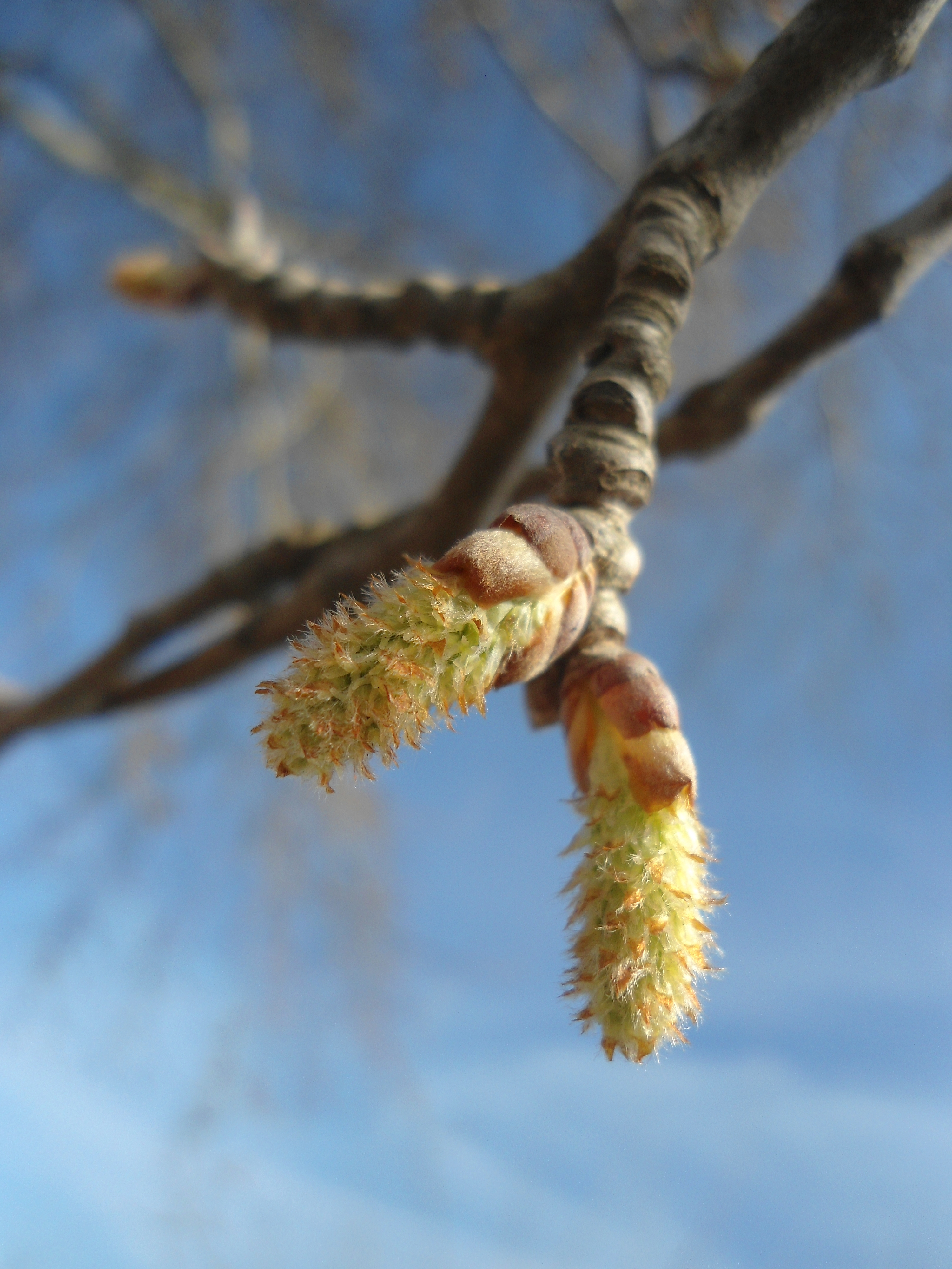 Бяла топола - женски съцветия.